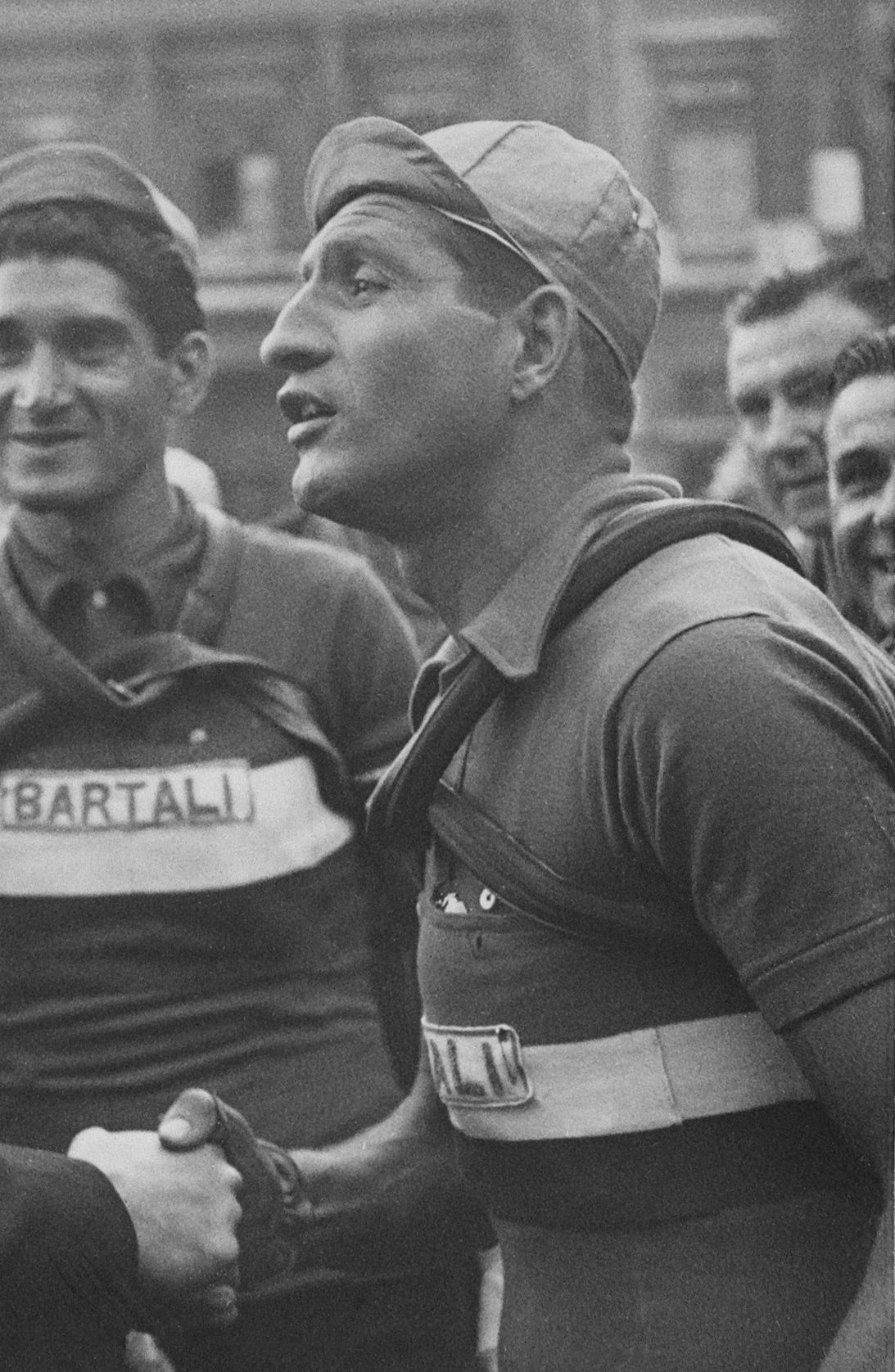 Wielrenner Bartali in gesprek met Orson Welles